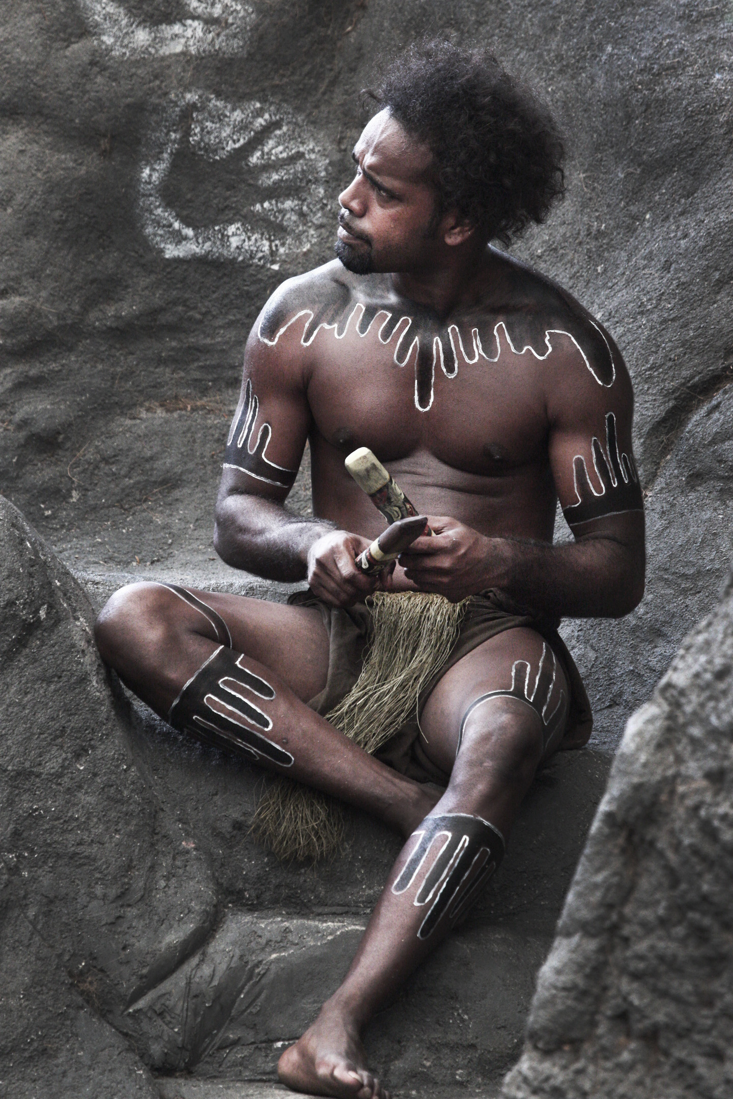 Australia: Aboriginal Culture 001